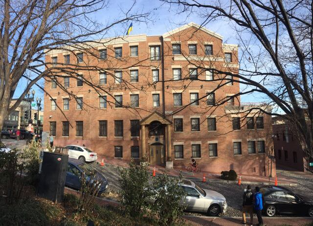 Посольство України в США